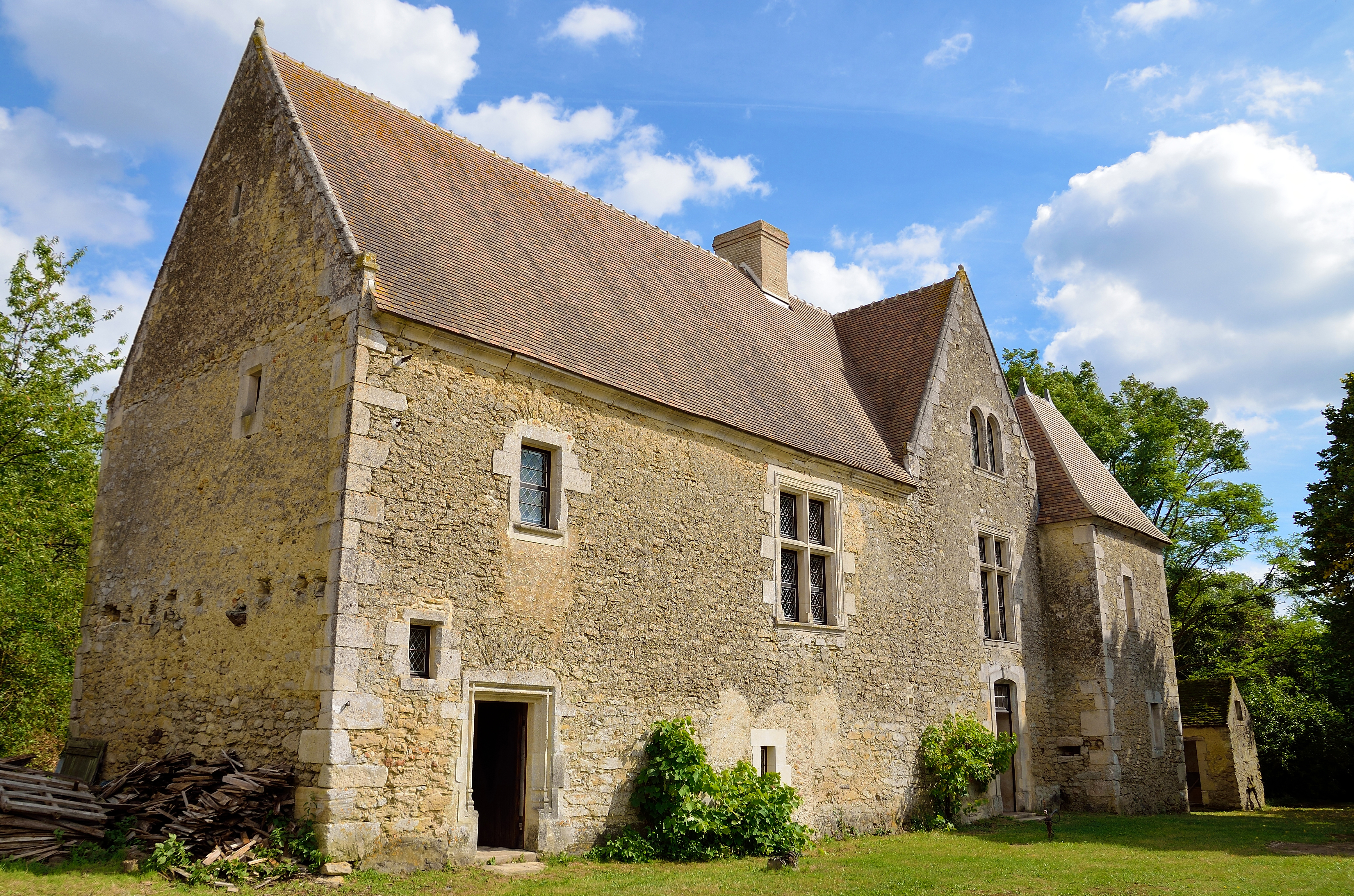 Pays de la Loire - Sarthe - Marolles-les-Braults .